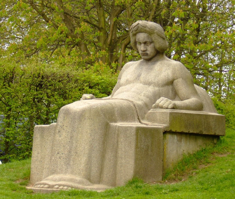 Peter Christian Breuer/Friedrich Diederich: Beethoven-Denkmal in der Bonner Rheinaue